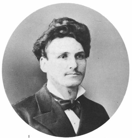 Стоян Заимов